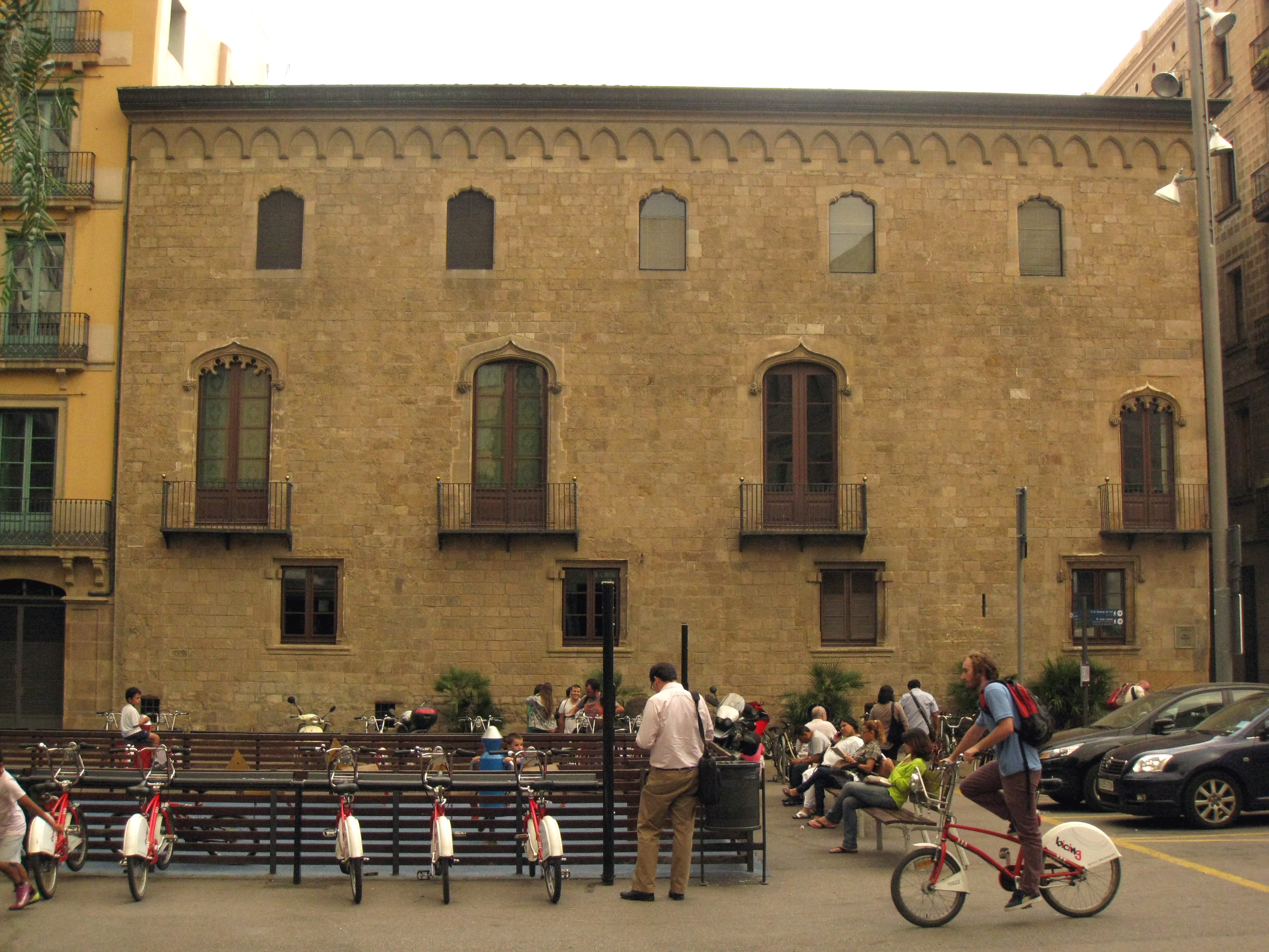 Parada de Bícing davant el palau Centelles (segle XV), a la plaça de Sant Miquel, al barri Gòtic de Barcelona